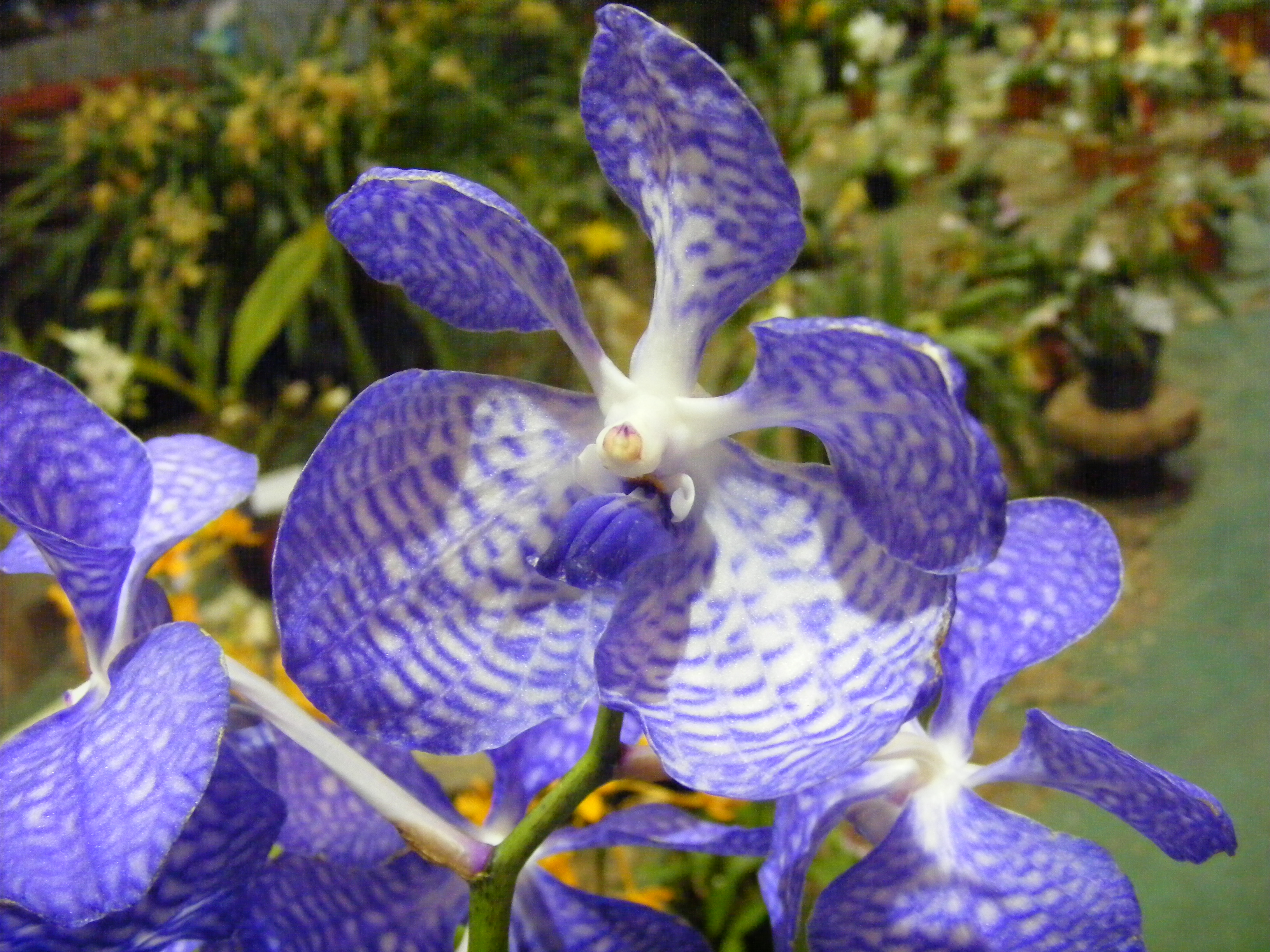 Orquídea en Costa Rica. Orchid in Costa Rica.